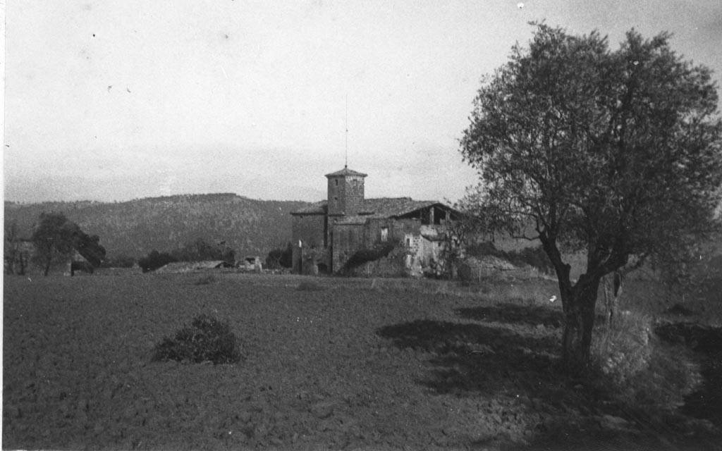 Vista llunyana de Can Xixons de Riner. Cèsar August Torras i Ferreri (Entre 1890 i 1923)